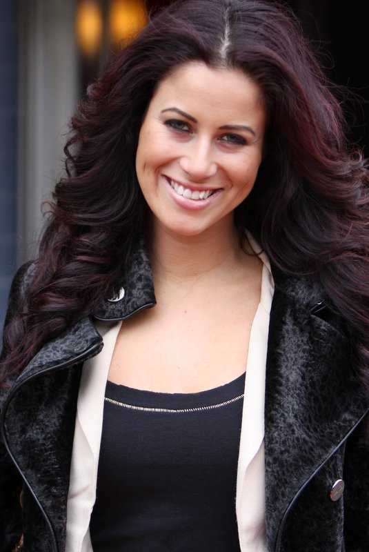 Nederlands model & zangeres